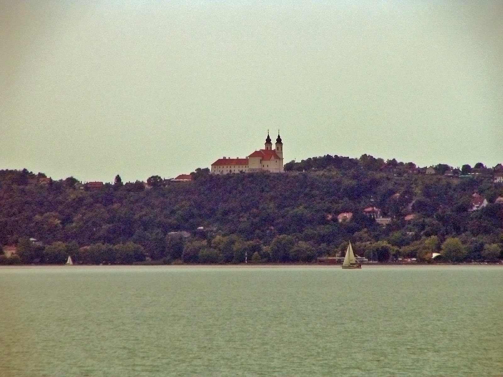 Tihany_abbey (Hungary)